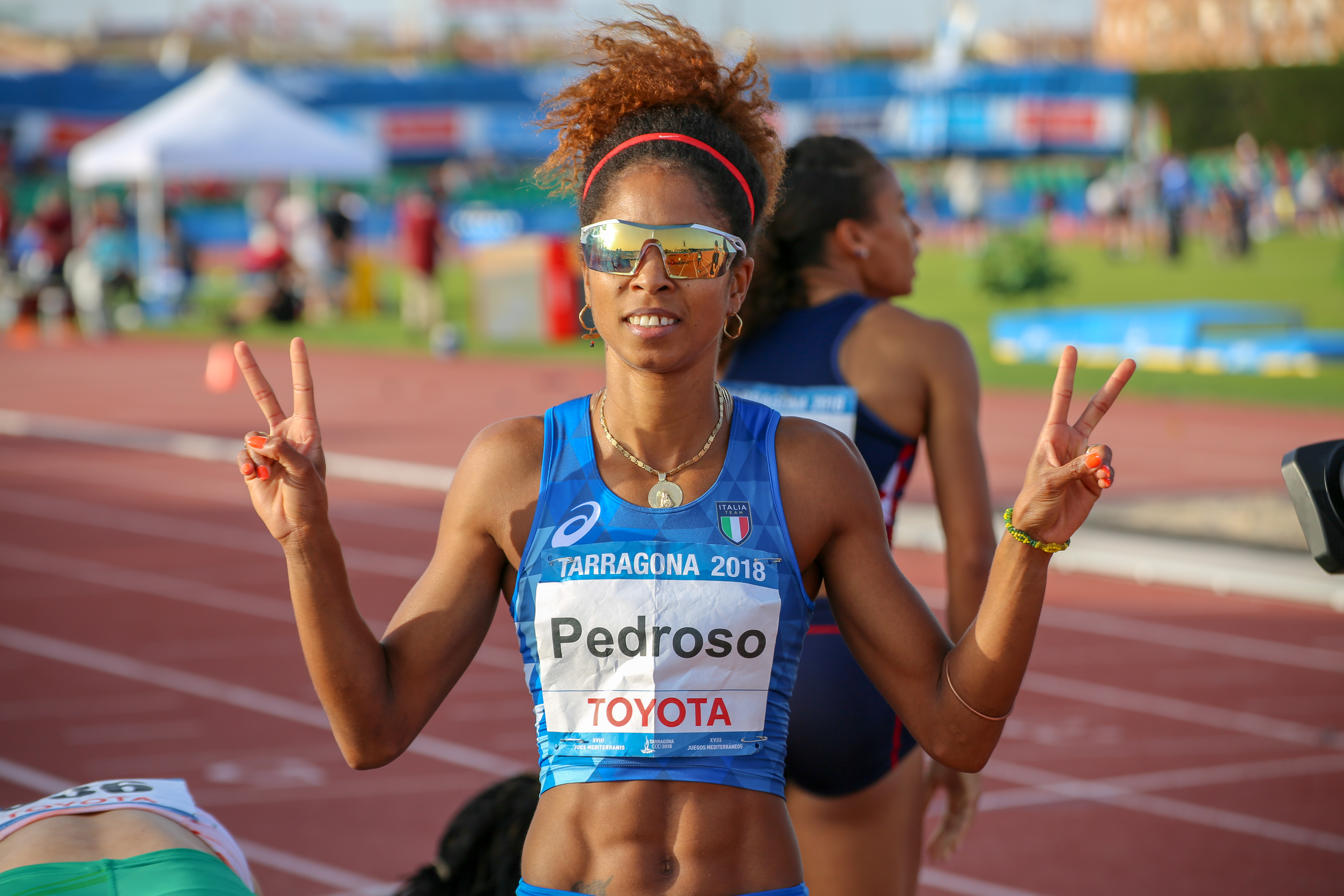 Yadisleidy Pedroso, en los 400 metros vallas de los Juegos del Mediterráneo 2018